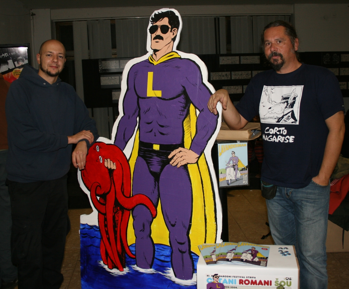 autori stripa Lavanderman na CRŠ-u 2008.